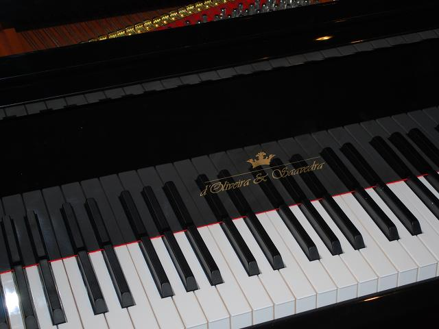 Pormenor